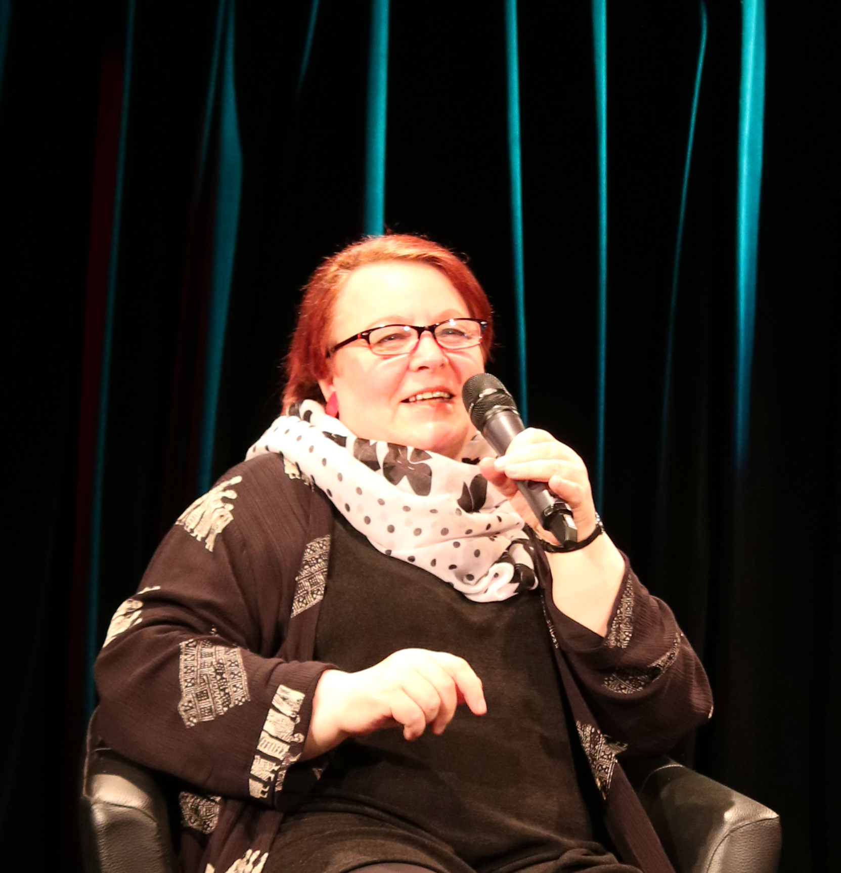 Natascha Wodin am 10. Juni 2016 bei einer Lesung im Kulturforum Fürth